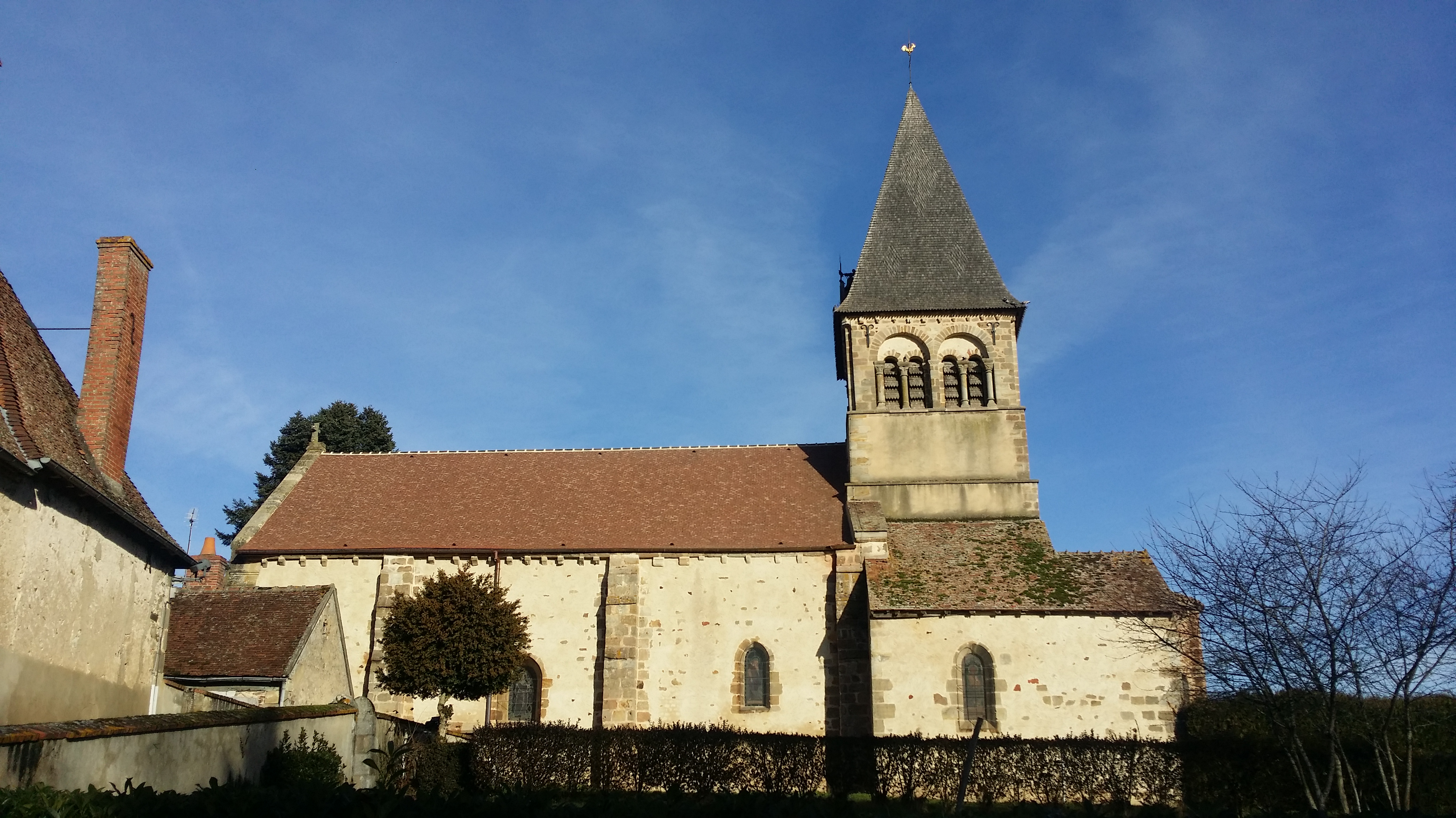 Eglise Saint Pierre Theneuille